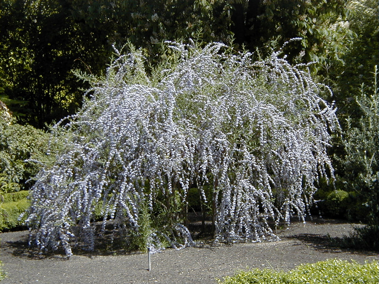 Buddleja alternifolia. Real Jardín Botánico, Madrid, España.